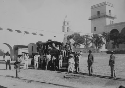 Hacienda San Diego Atlihuayán (autor y año desconocido, colección particular Dr. Raúl Berrones Flores)